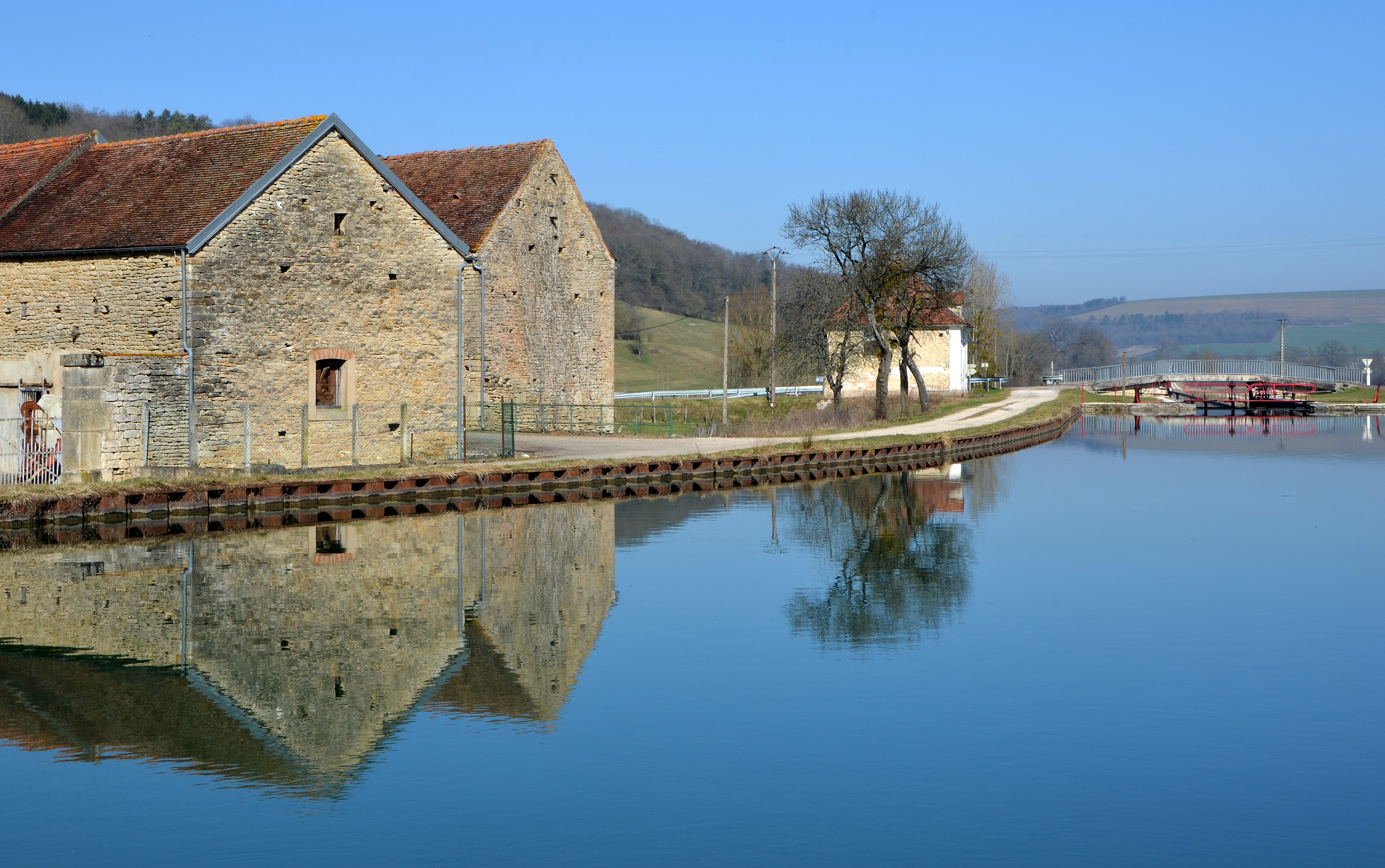 Canal de Bourgogne : Courcelle les Montbard , Bourgogne, France